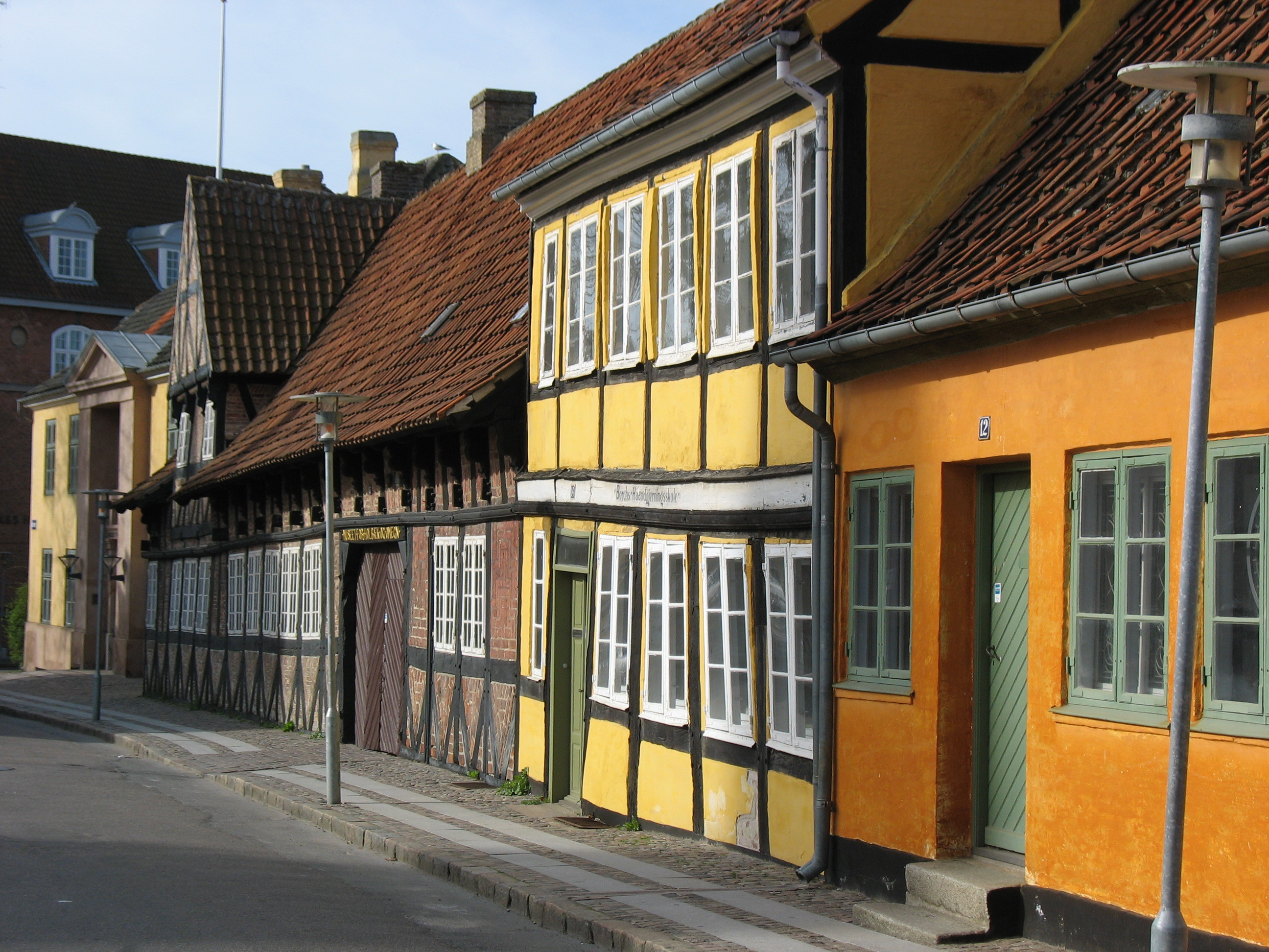 Gamle huse i Holbæk